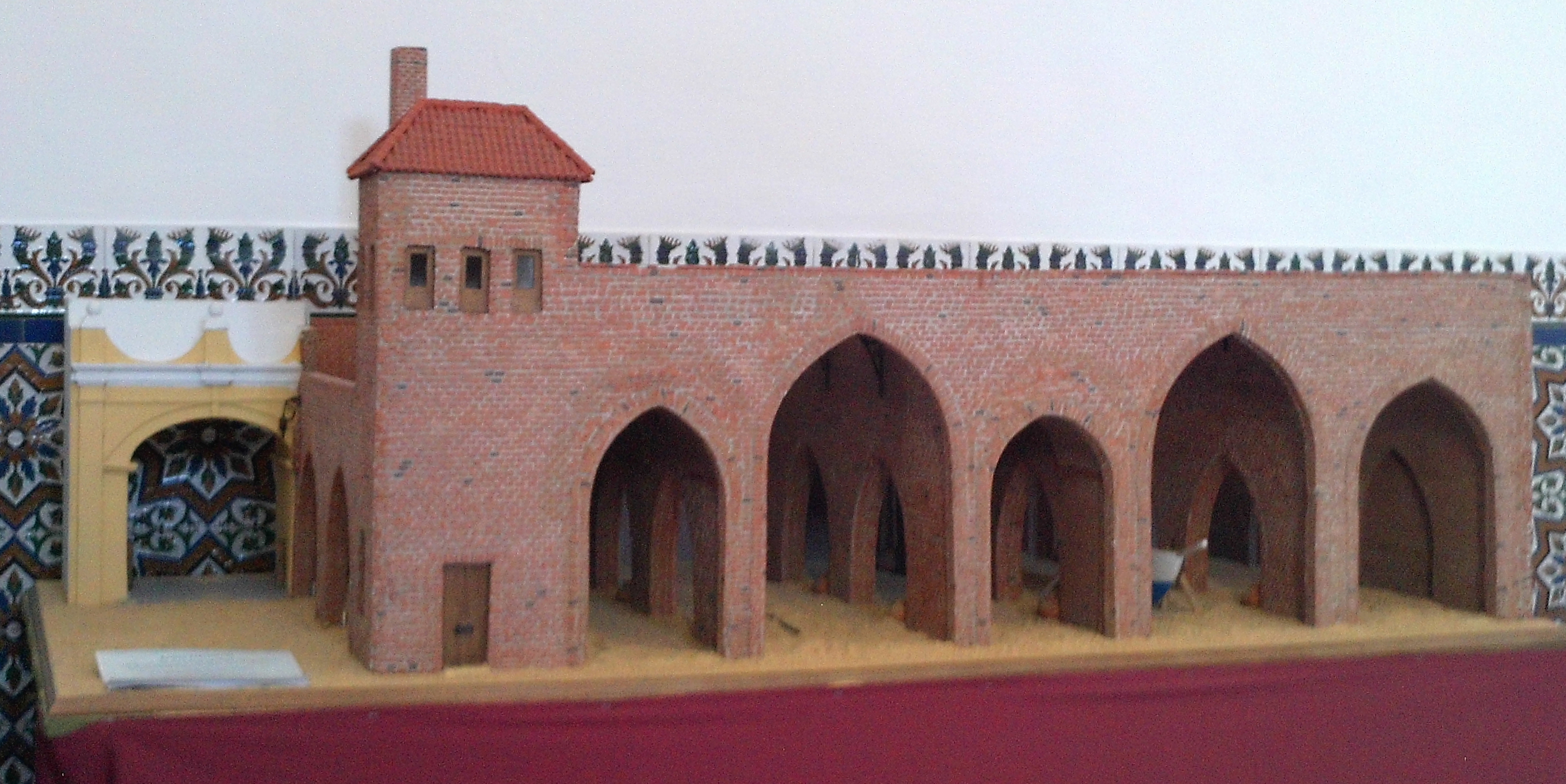 Maqueta de las Atarazanas de Sevilla para el Belén de la Solidaridad de 2010. Hogar Virgen de los Reyes. Sevilla, Andalucía, España.